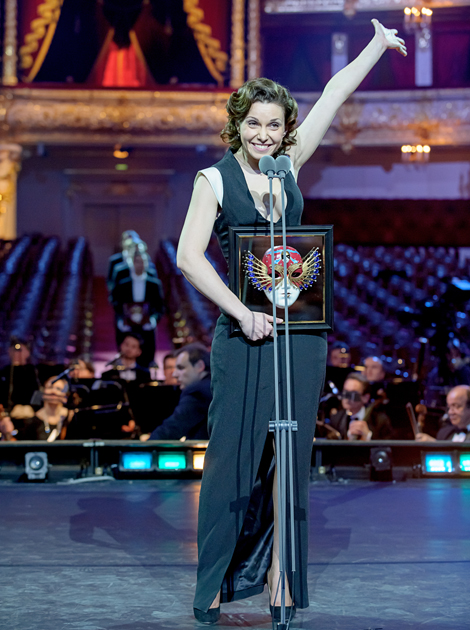 Александра Урсуляк - Фотограф Дмитрий Дубинский 2014